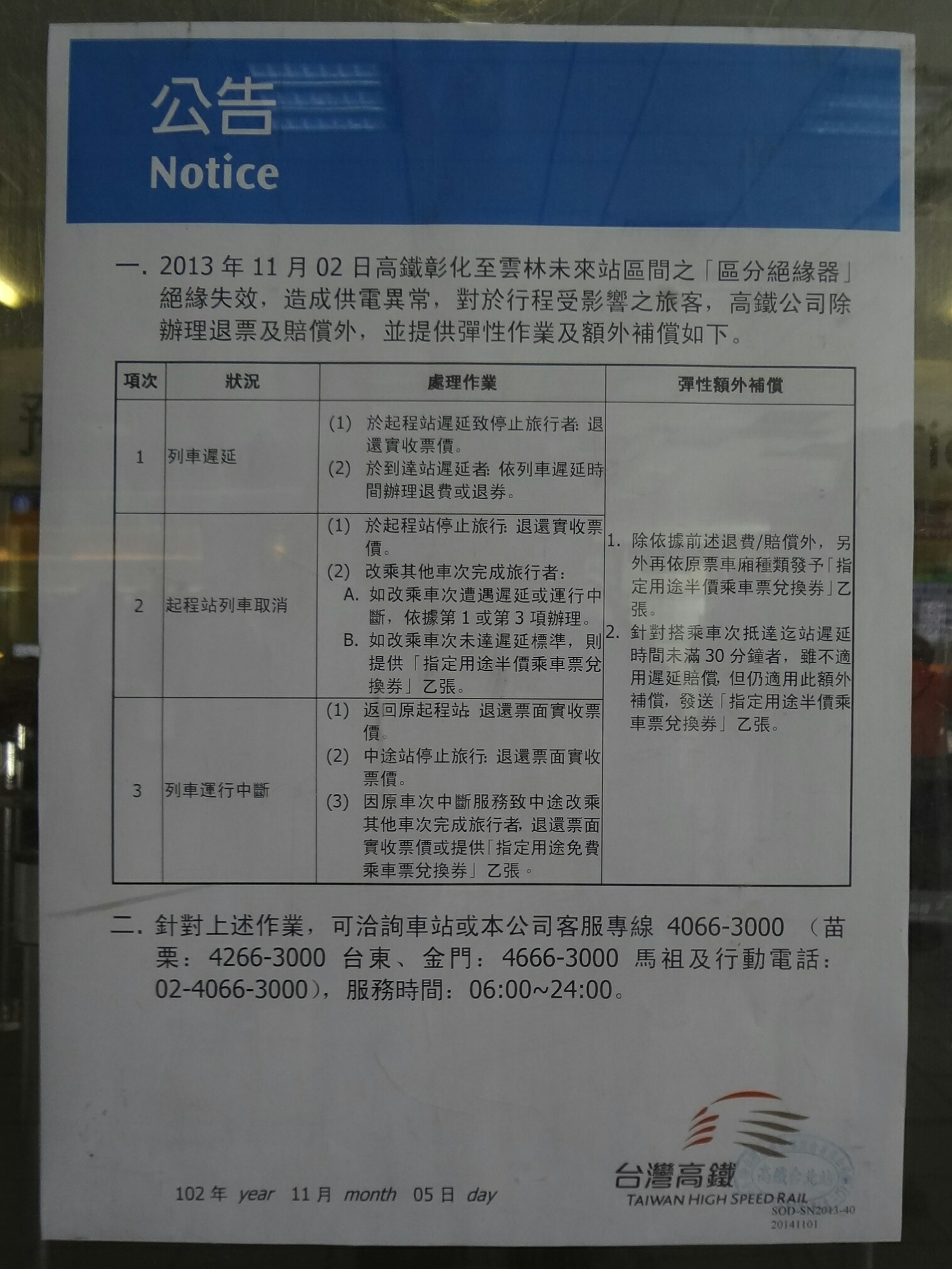 台灣高鐵2013年11月5日公告